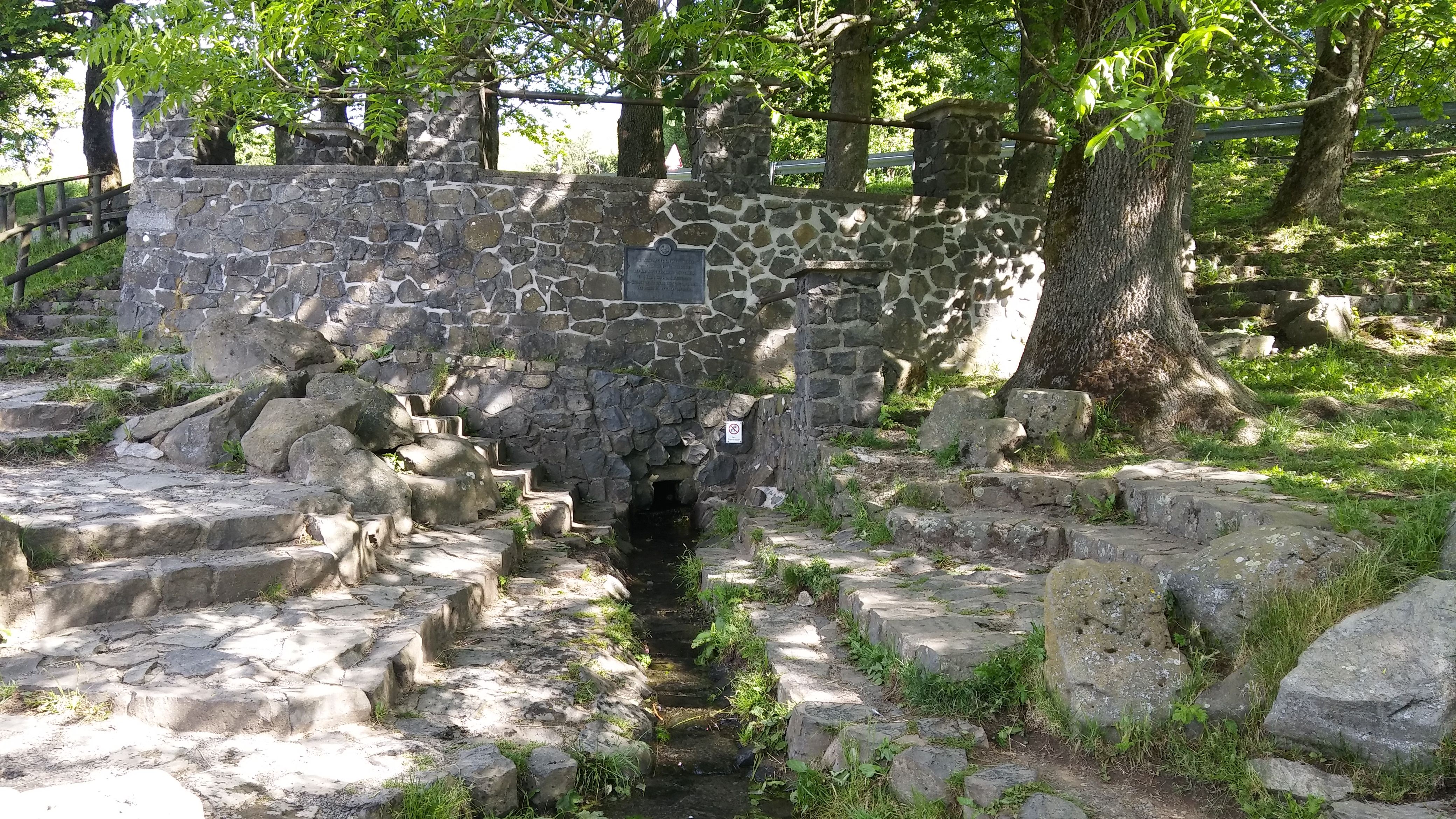 Fuldaquelle Übersichtsfoto